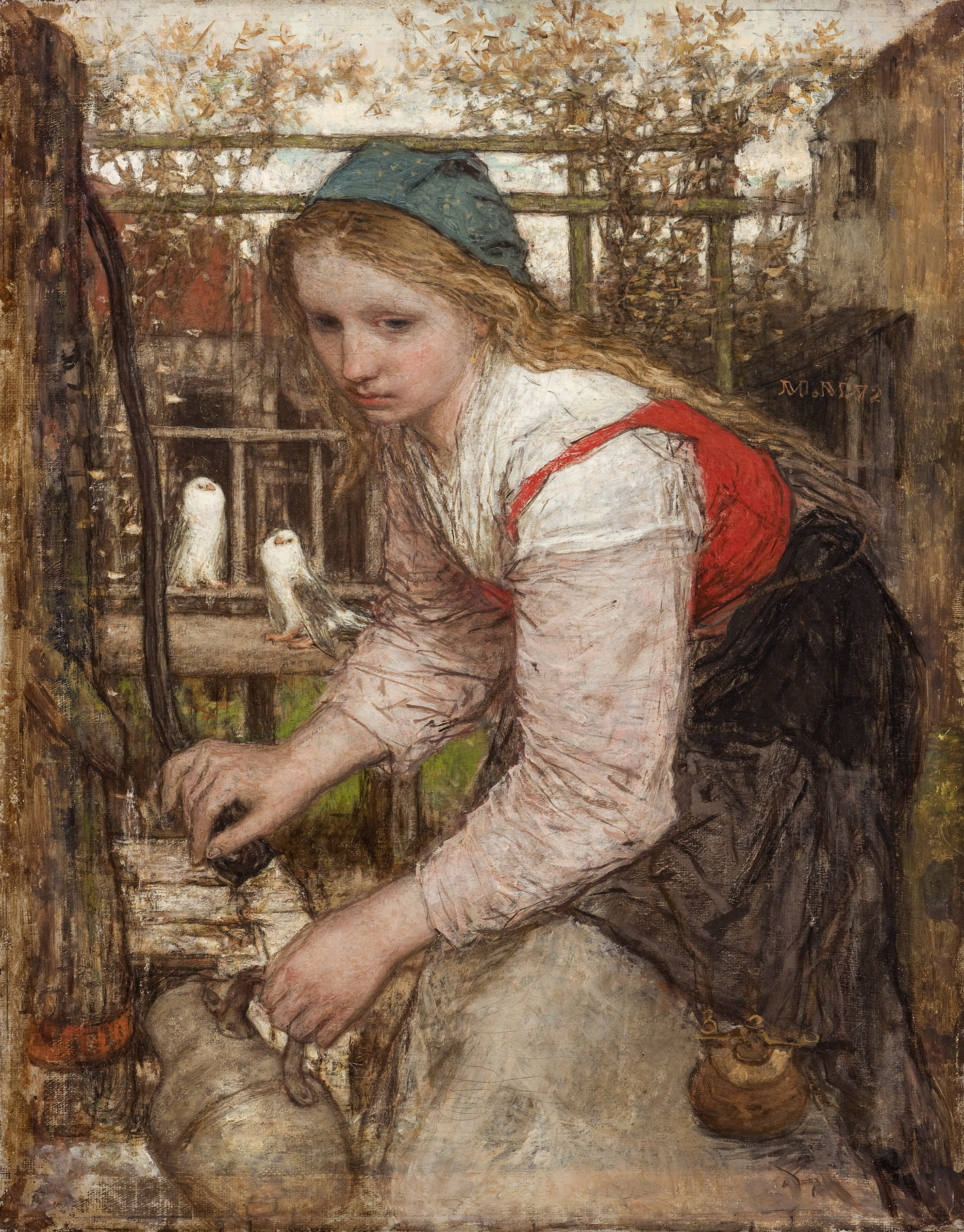 Meisje aan de pomp by Matthijs Maris, 1872